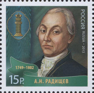 Серия "Выдающиеся юристы России"